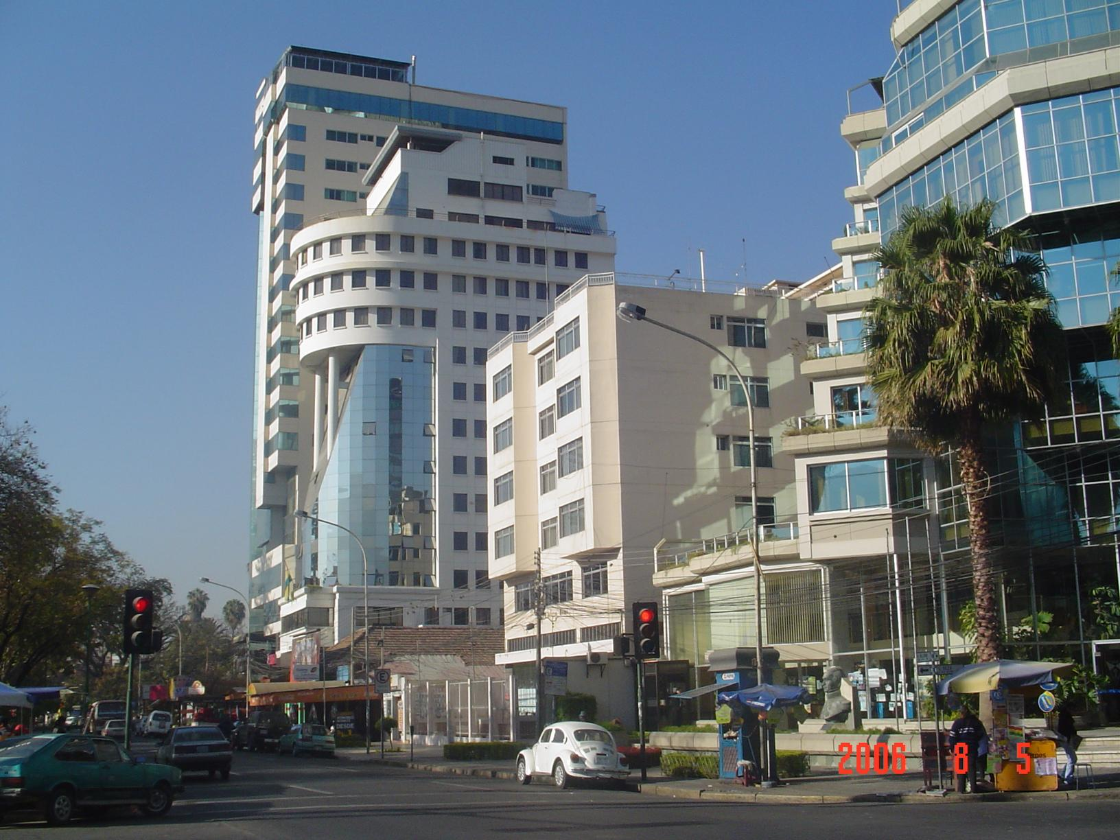 COCHABAMBA - El Prado